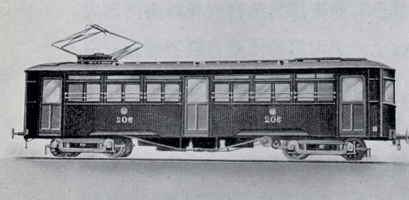 尾西鉄道デボ200形電車